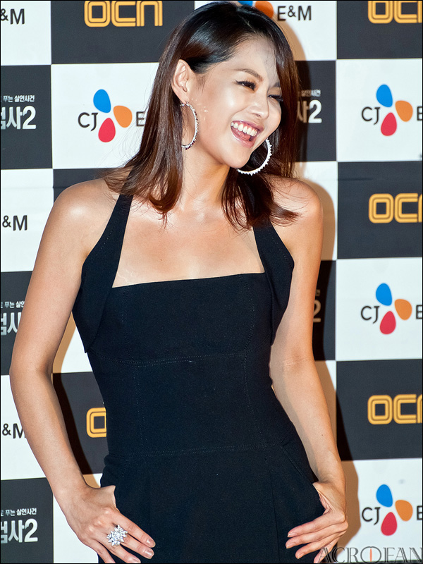 OCN 뱀파이어검사 시즌 2 시사회 및 제작발표회에 참석한 이영아